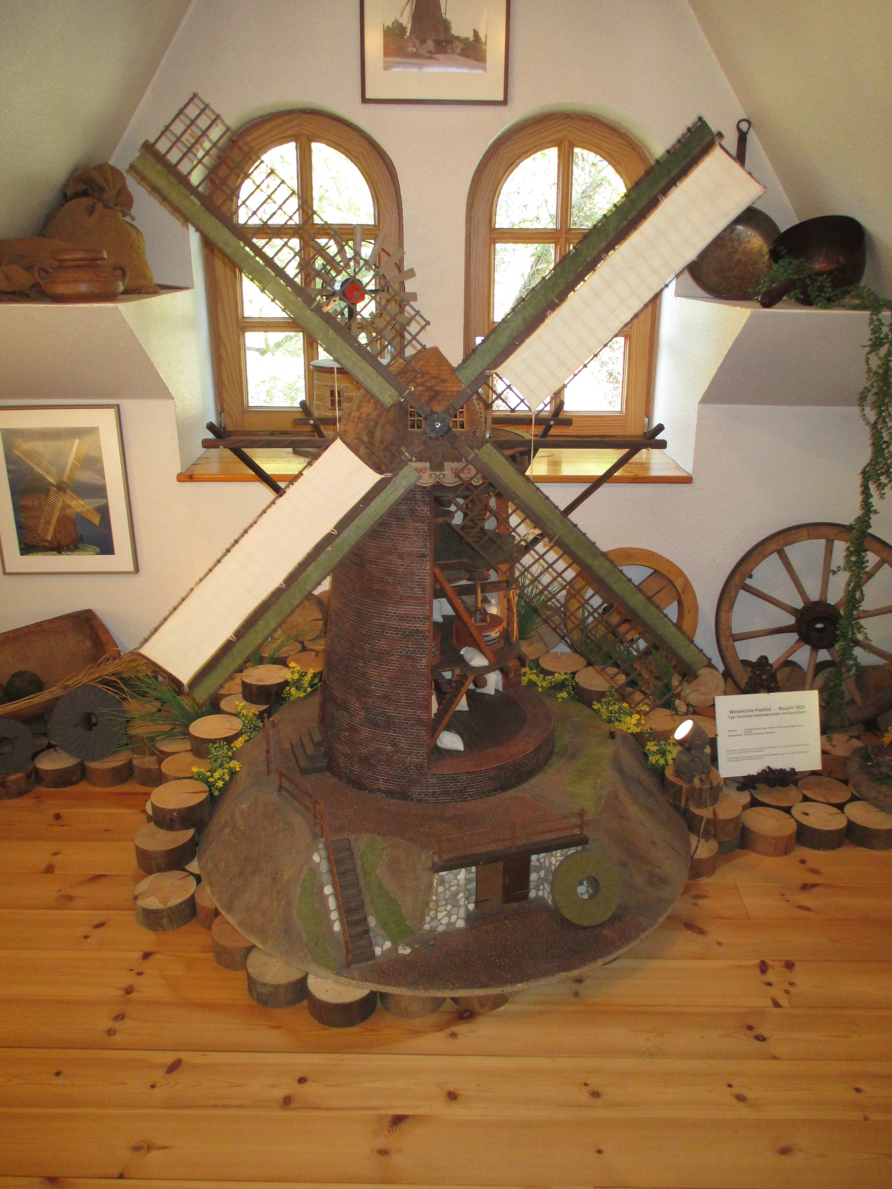 Modell der Windmühle Hiesfeld im Mühlenmuseum Hiesfeld.